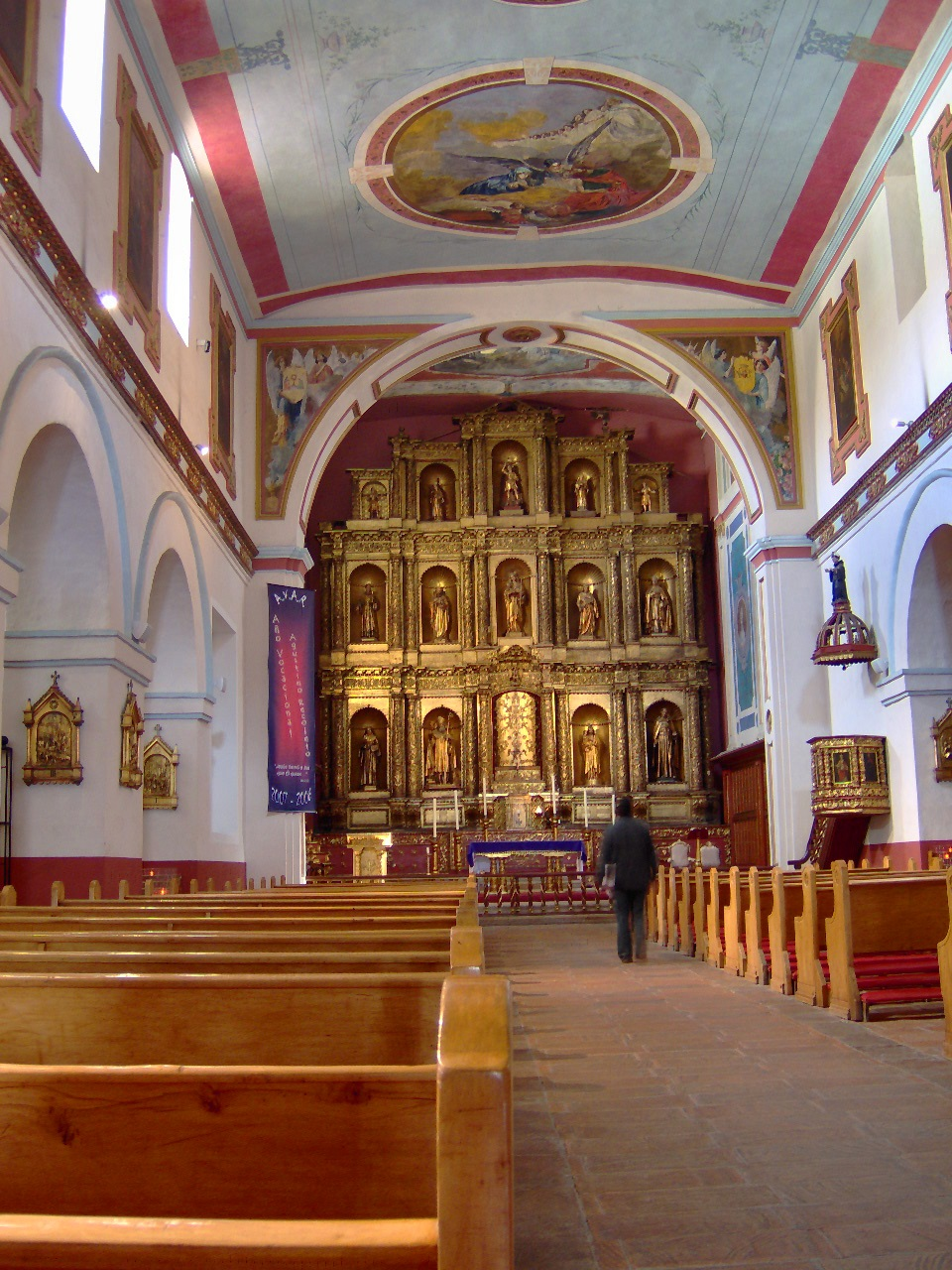 Nave central de la Iglesia de Nuestra Señora de la Candelaria. Bogotá, Colombia.